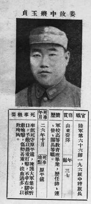 中文（台灣）: 抗戰軍人忠烈錄第一輯中的烈士遺像